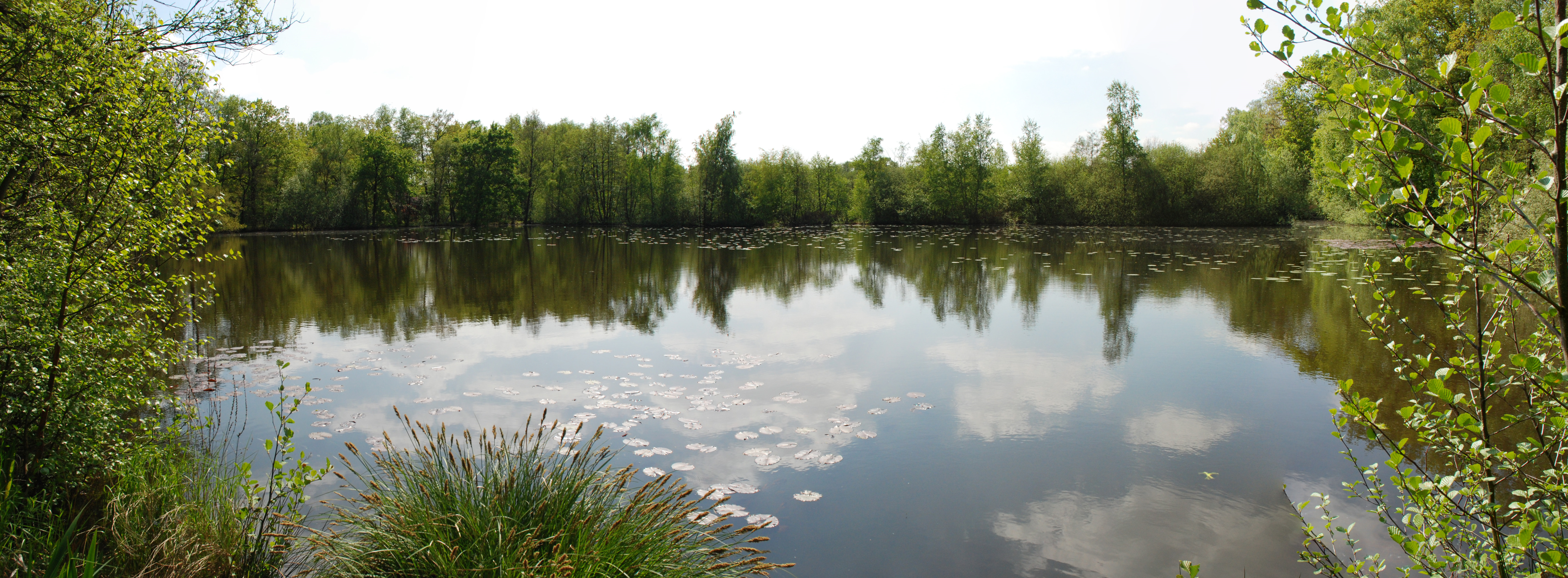 Panoramische foto van een vijver te Bokrijk, Genk, België